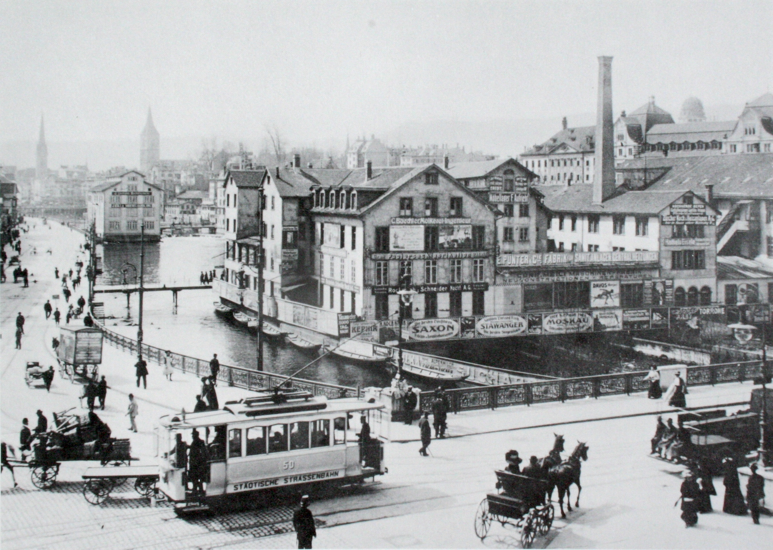 Beim1910 Die Limmat wurde 1949 ausgeräumt